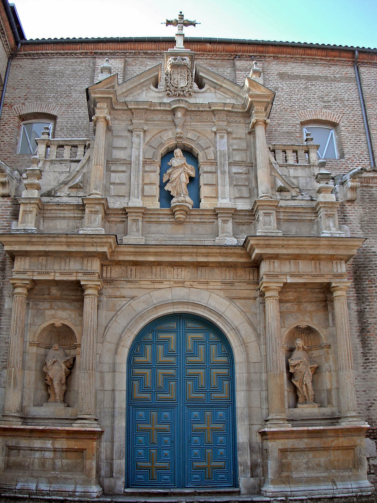 Convento de las Comendadoras de Santa Cruz en Valladolid